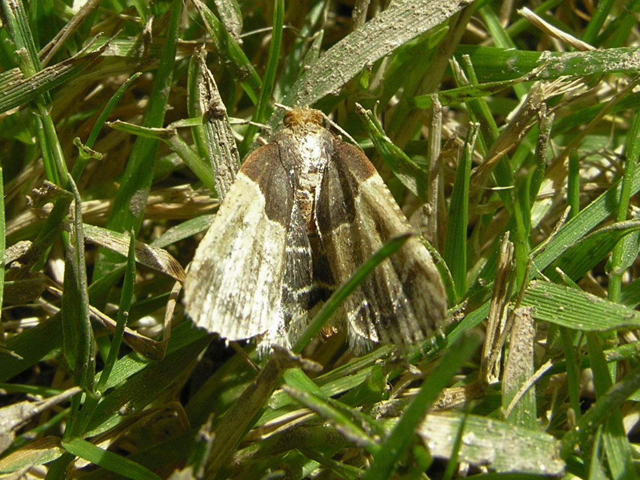 Pyralis farinalis (Pyralidae). Fotografada en Bastabales. Galicia